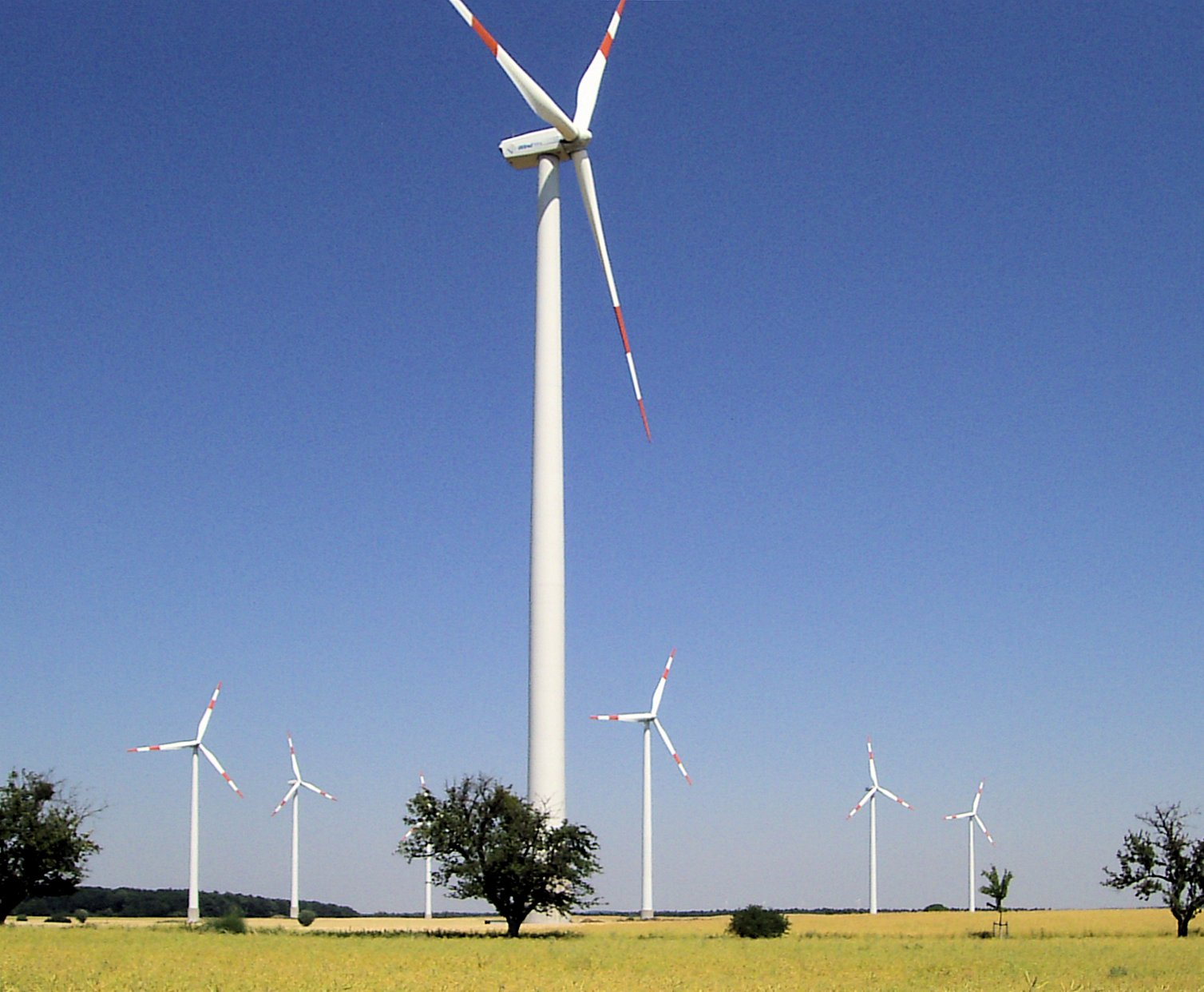 Für die Uckermark heute prägend: einer der zahlreichen Windparks – hier nahe Mark Landin